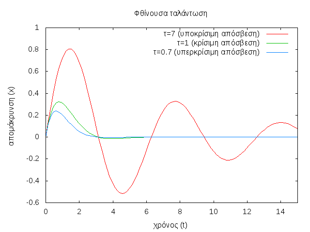 Γραφική παράσταση της μετατόπισης συναρτήσει του χρόνου για τις τρεις βασικές περιπτώσεις ταλάντωσης - υποκρίσιμη, κρίσιμη και υπερκρίσιμη.